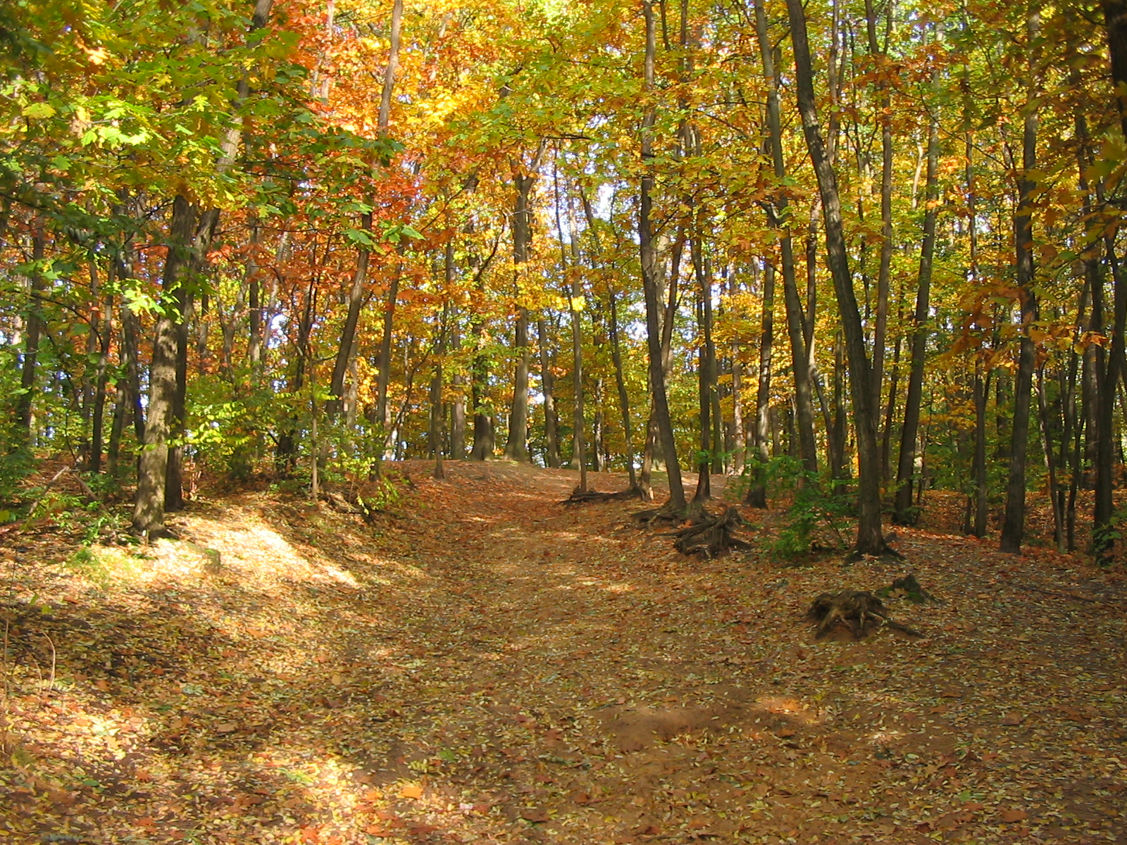 Wzgórza Piastowskie w Zielonej Górze jesienią Autor: Mohylek 14:08, 27 March 2007 (UTC)